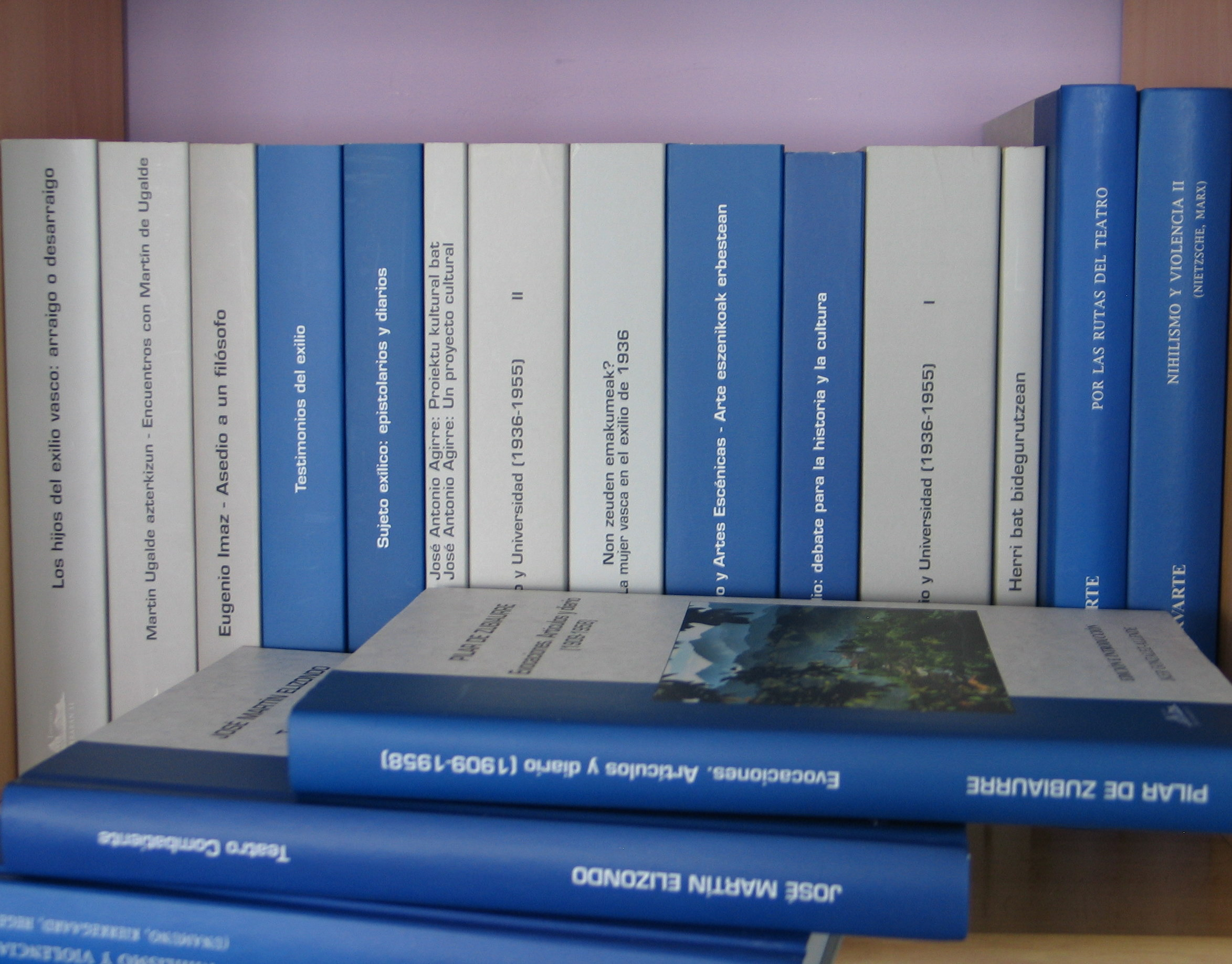 Elkarte horren erbesteari buruzko publikazio batzuk agertzen dira argazki honetan.